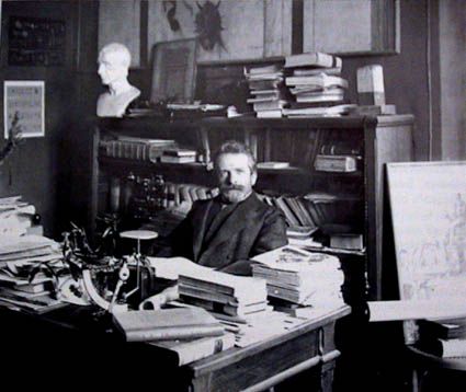 Giacomo Boni nel suo studio a Roma Fonte: [1]